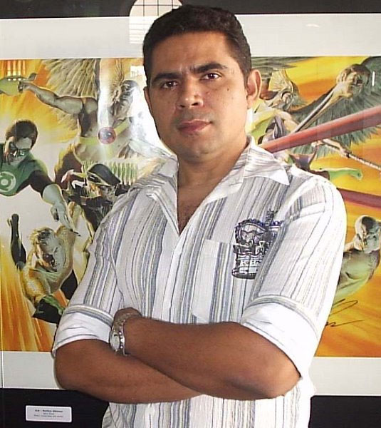 תמונתו של המאייר אד בניס